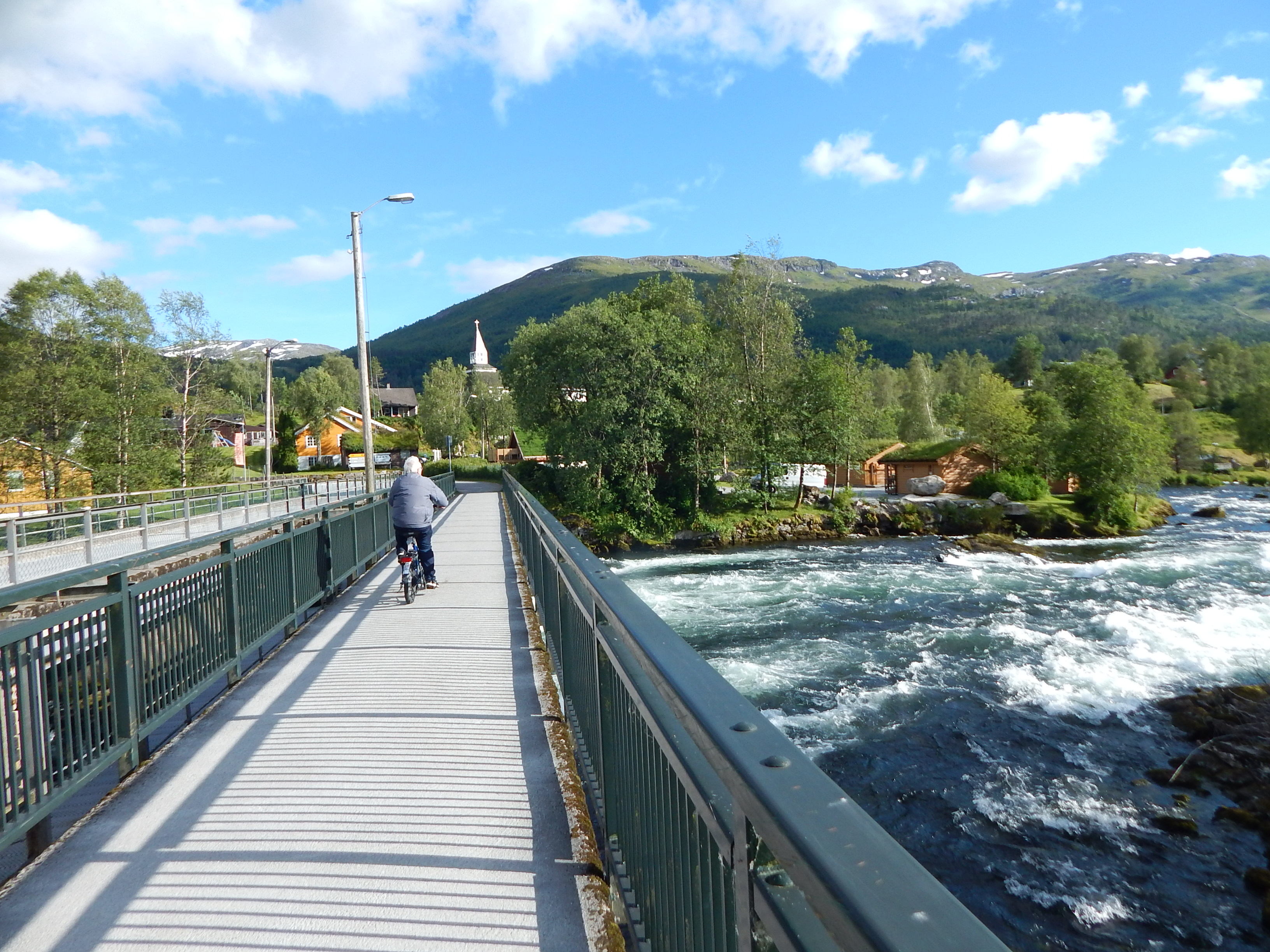 Fylkesvei 451 på Bro over Jølstra ved Vassenden